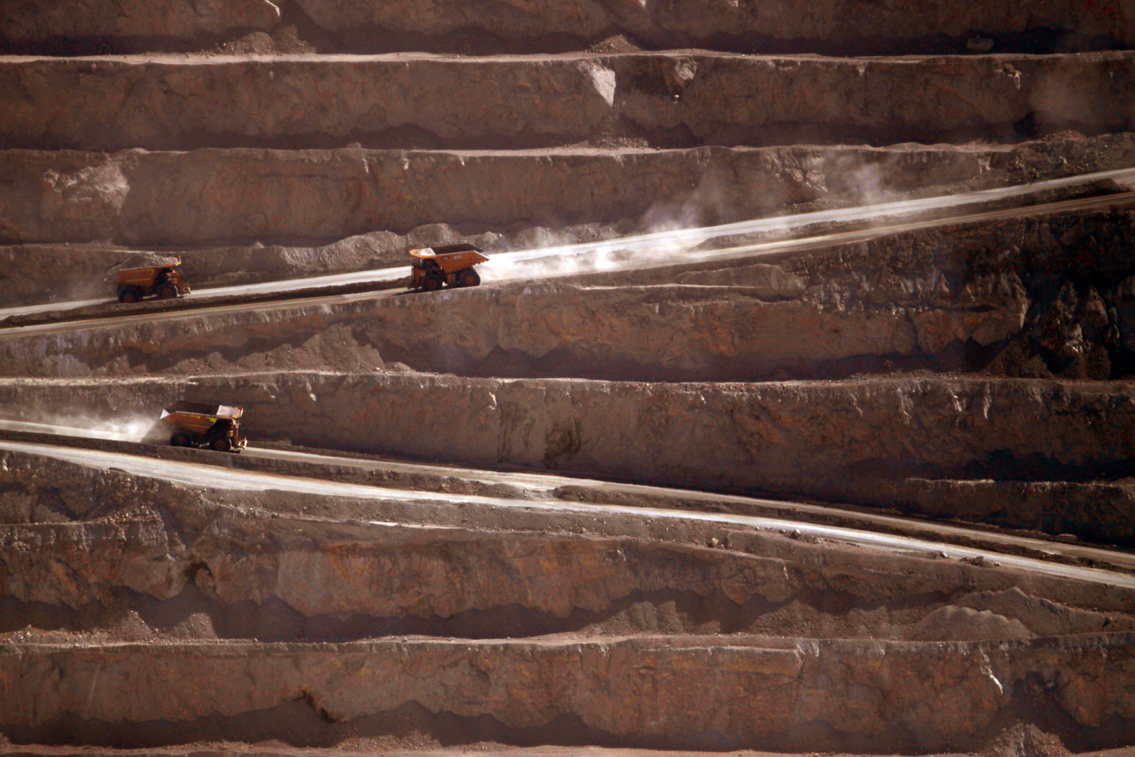 Mina La Escondida, parte de la empresa Minera Escondida.